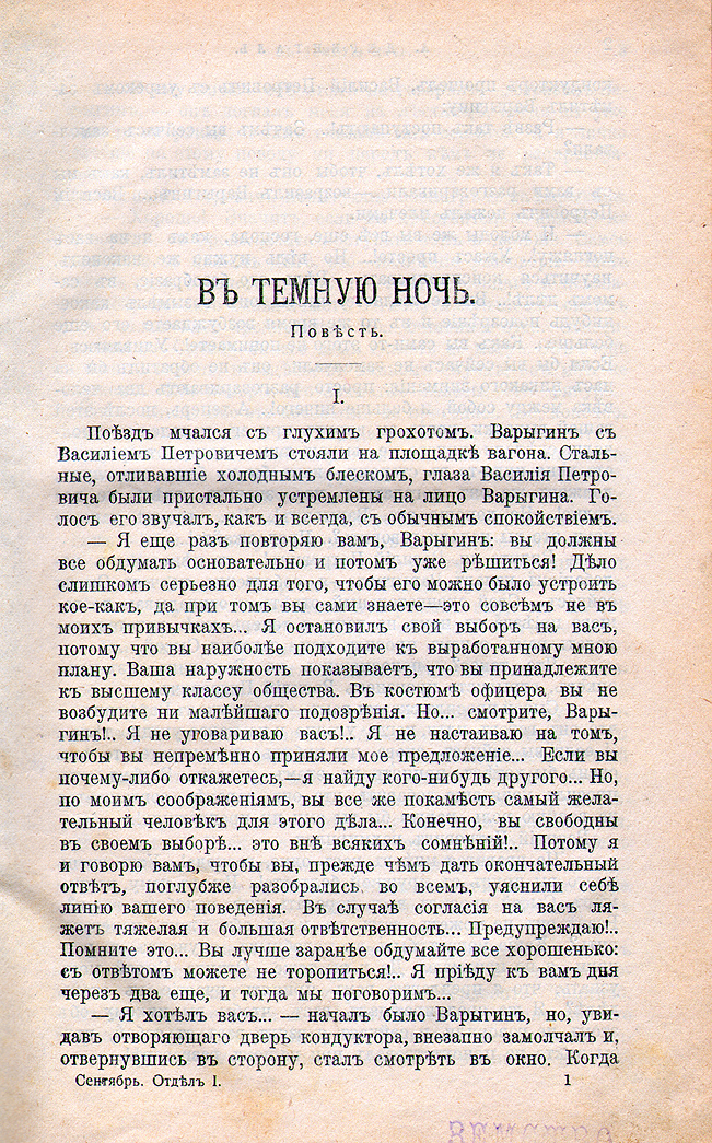 В тёмную ночь. Повесть А.Дикгофа-Деренталя в журнале "Русское богатство", 1907 г. сентябрь